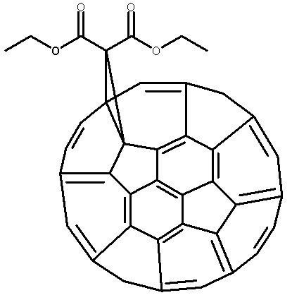 Bingel fullerene